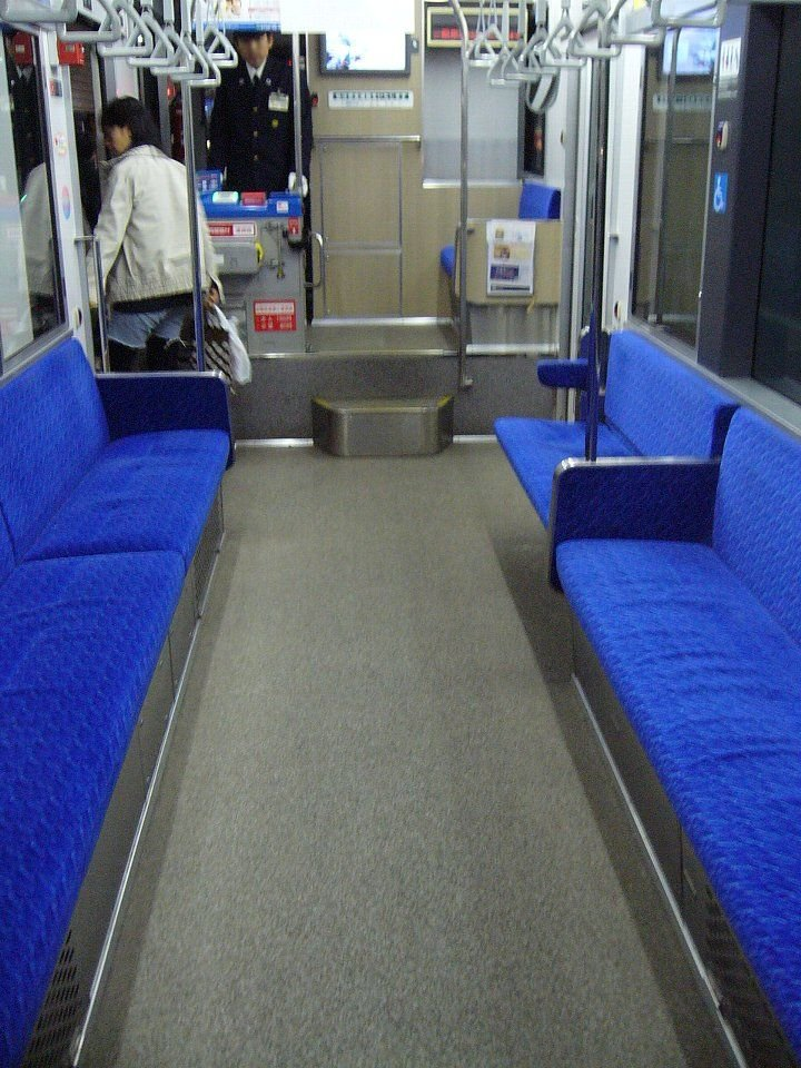 伊予鉄道モハ2100形電車（2105；ICい～カード宣伝車）車内